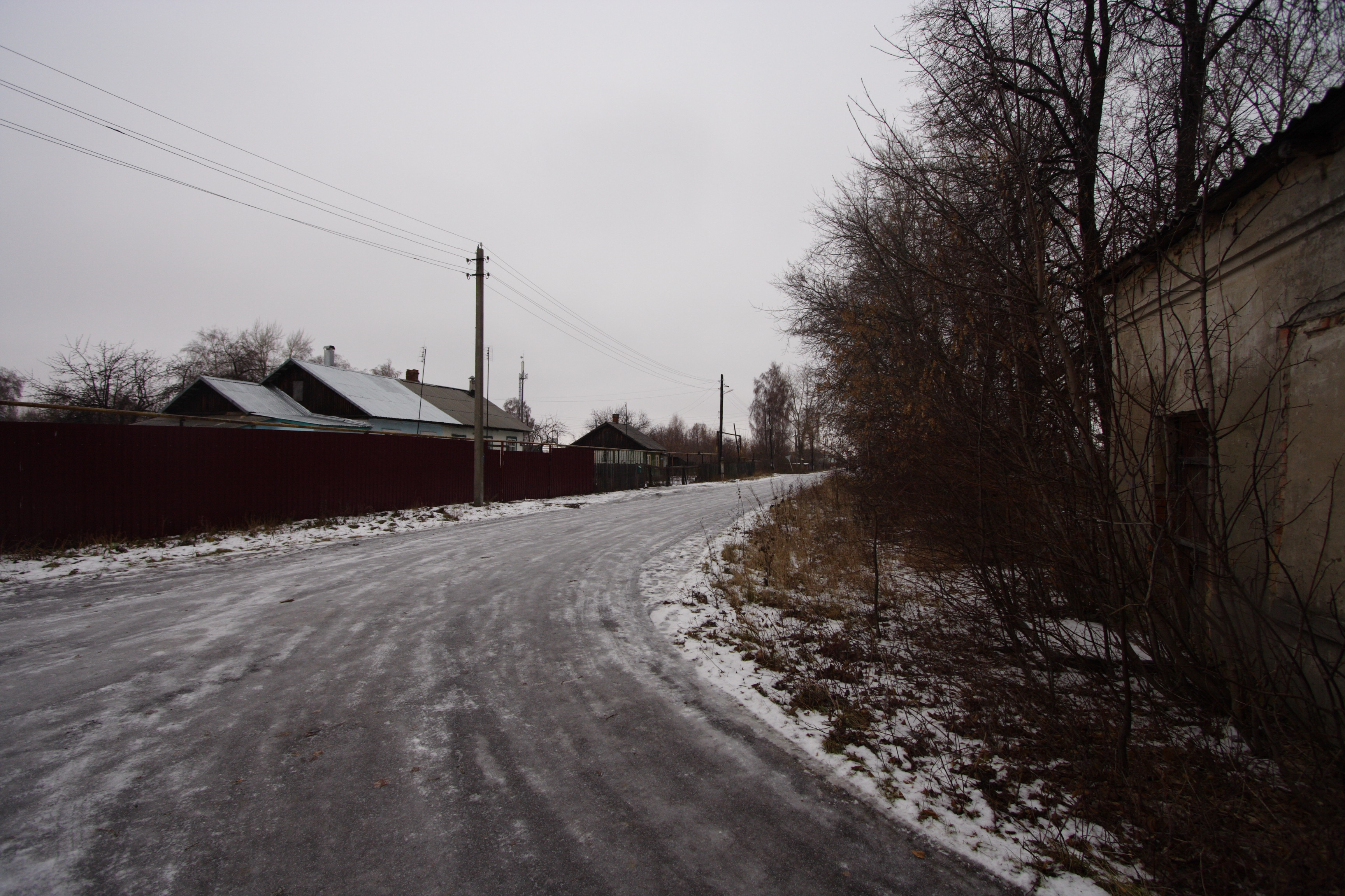 Новольвовск